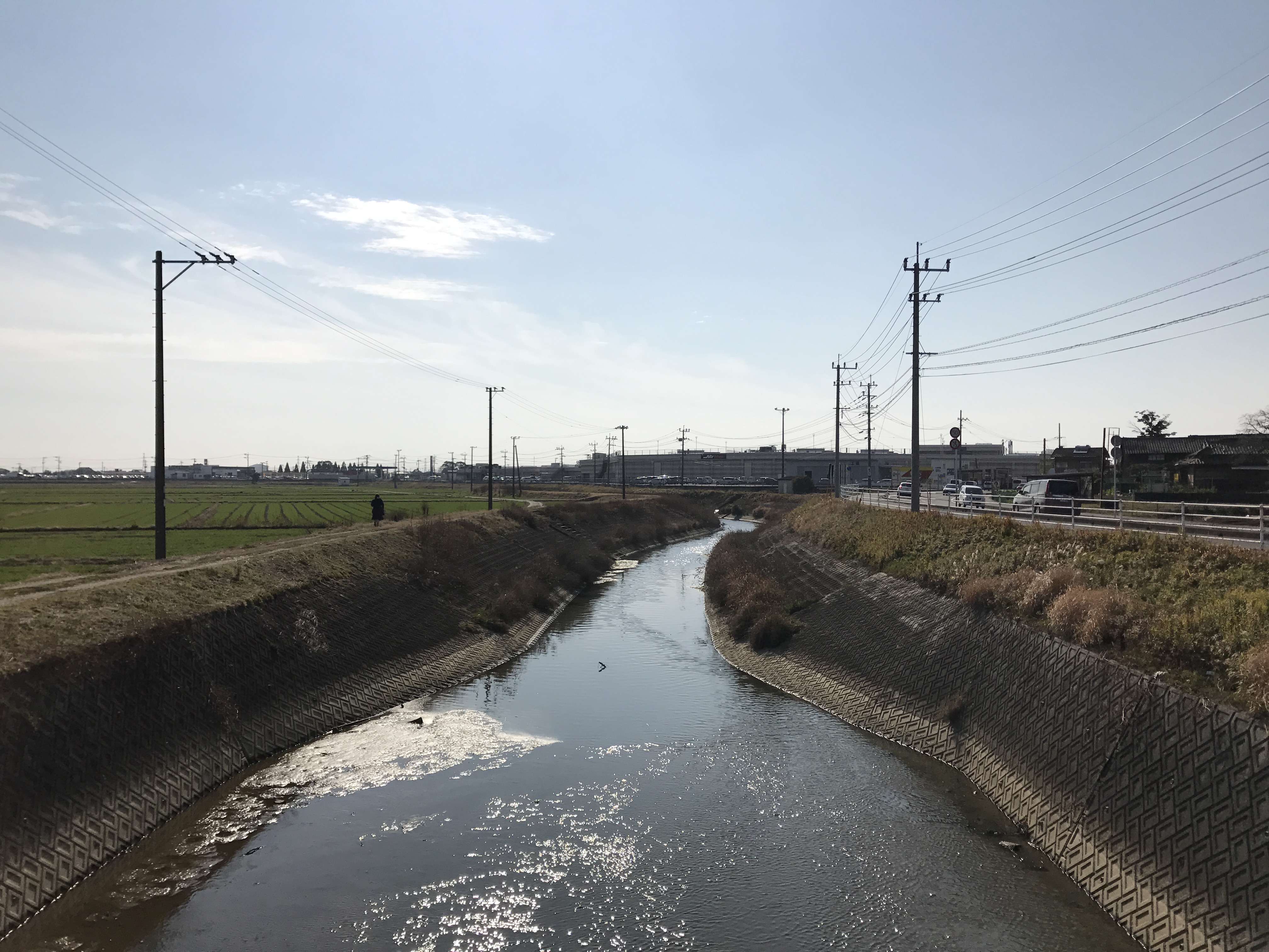 千栗橋より望む沼川(下流側)